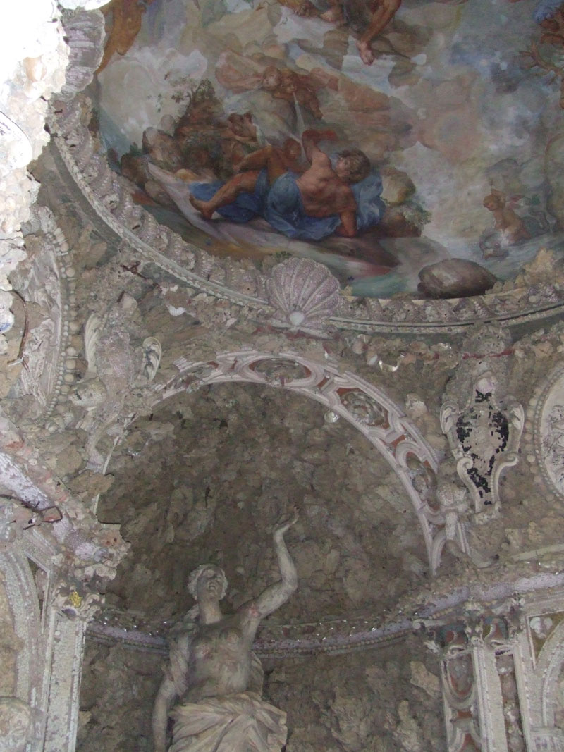 Castello di Montegufoni - Fresco alla Grotta